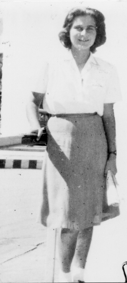 פלוגה ח' א - ברכה פולד. ברכה פולד